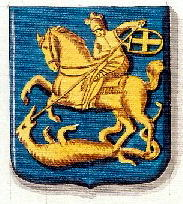 Het wapen van de stad Terborg (Gelderland)